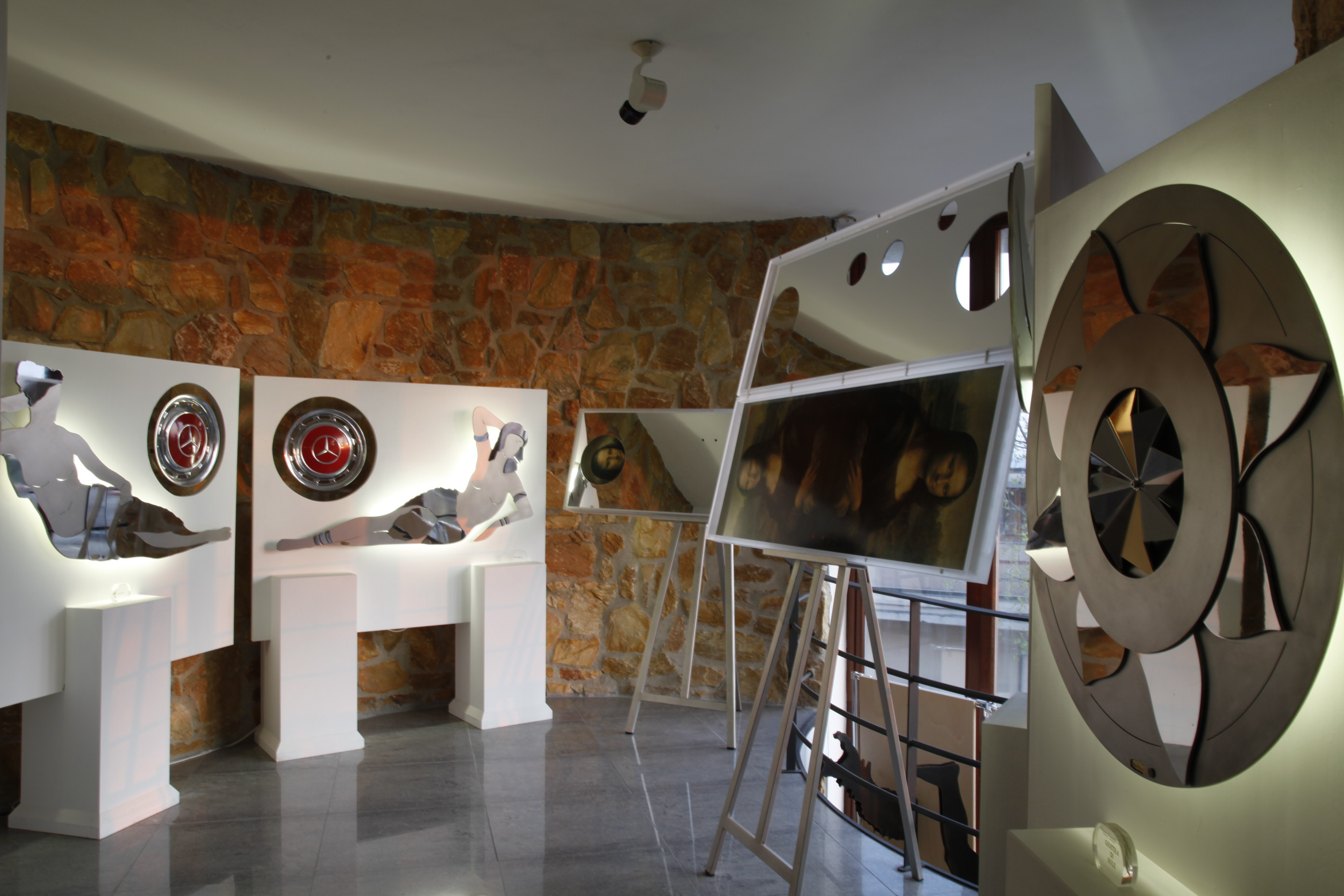 Opere di art-design di Oreste Ruggiero